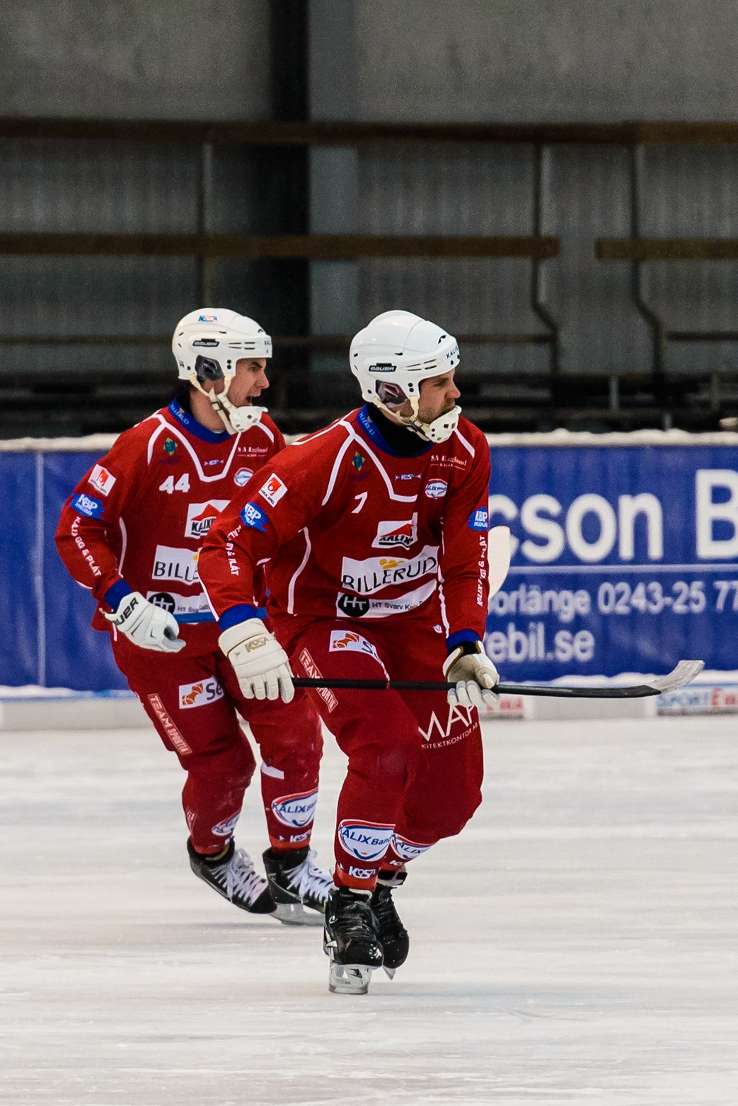 Kalix Bandy-spelarna Magnus Johansson (#7) och Peter Stock (#44). Allsvenskan i Bandy 2012/2013, på Lugnets isstadion, mellan Falu BS och Kalix Bandy.